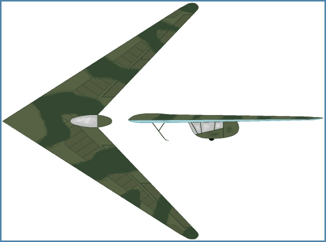 Horten H13a 1944